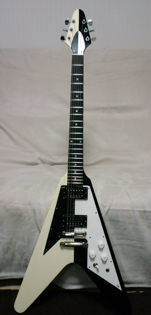 FLYING V '75 Michael Schenker replica